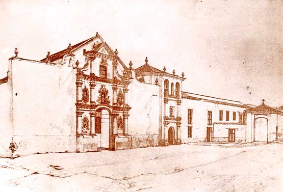 Convento de San Francisco, Caracas. Lugar del. Atentado de 1848. Antigua sede del Congreso de Venezuela